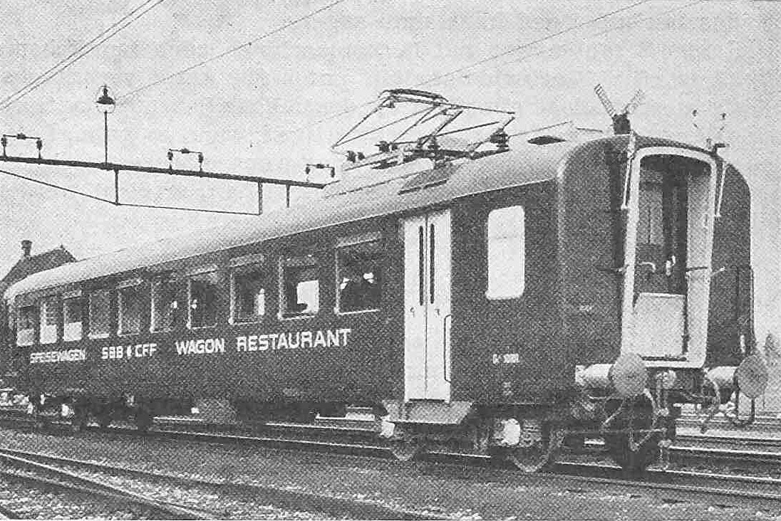 Aussenansicht des SBB-Leichtstahlspeisewagens